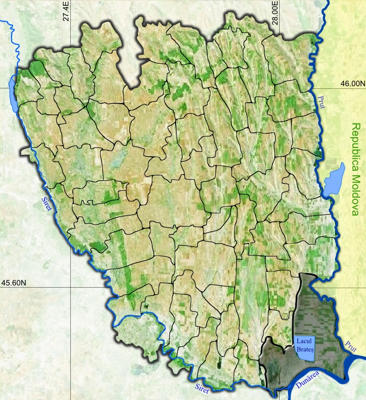 Galati jud Galati.